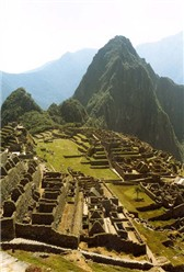 machu picchu van Robert Beunder